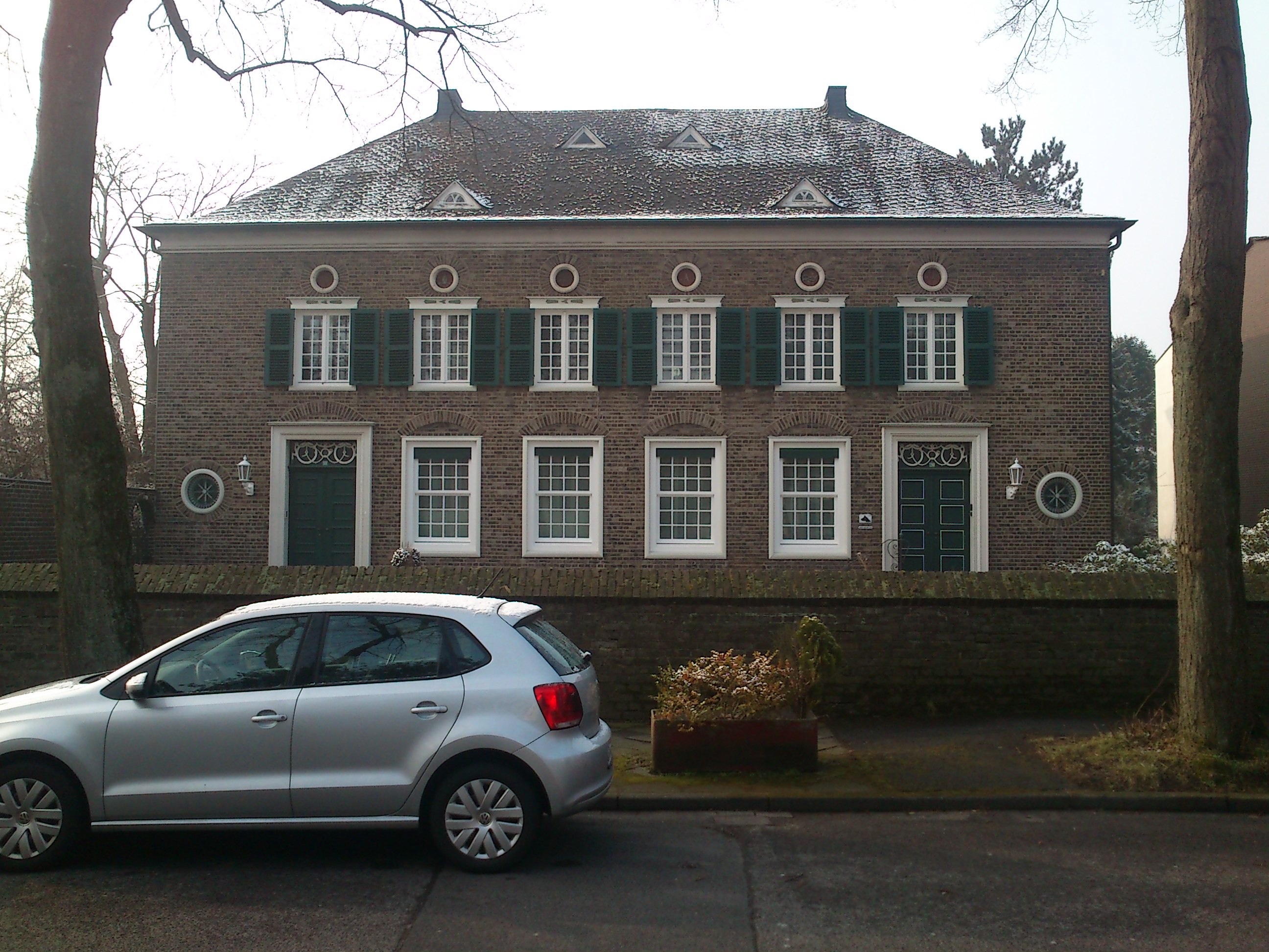 Doppelwohnhaus Hannemann in Düsseldorf-Lohausen, Lantzallee 18/20; erbaut 1925; unter Denkmalschutz